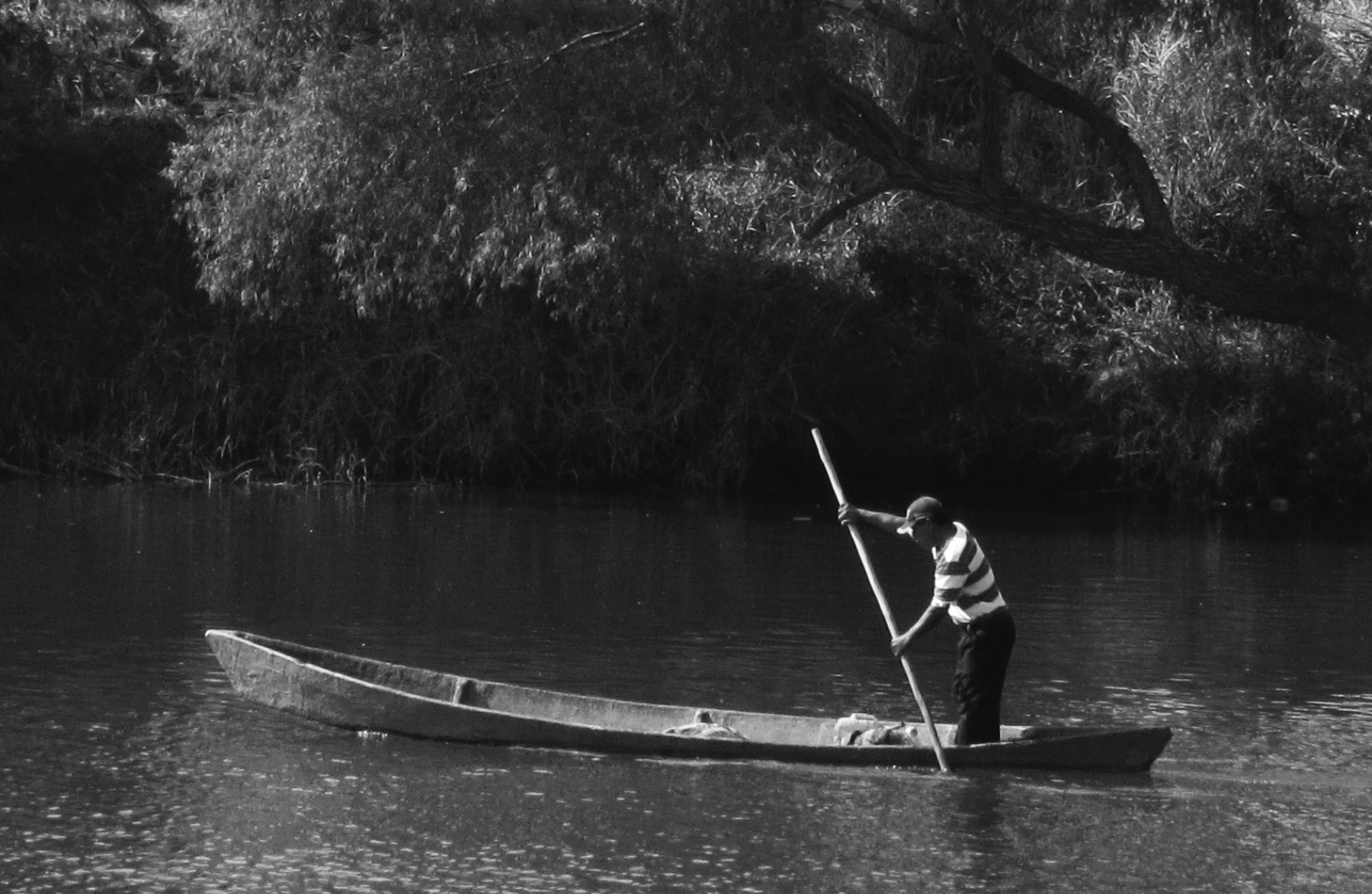 Hombre pescando en canoa en algún río de Veracruz, México